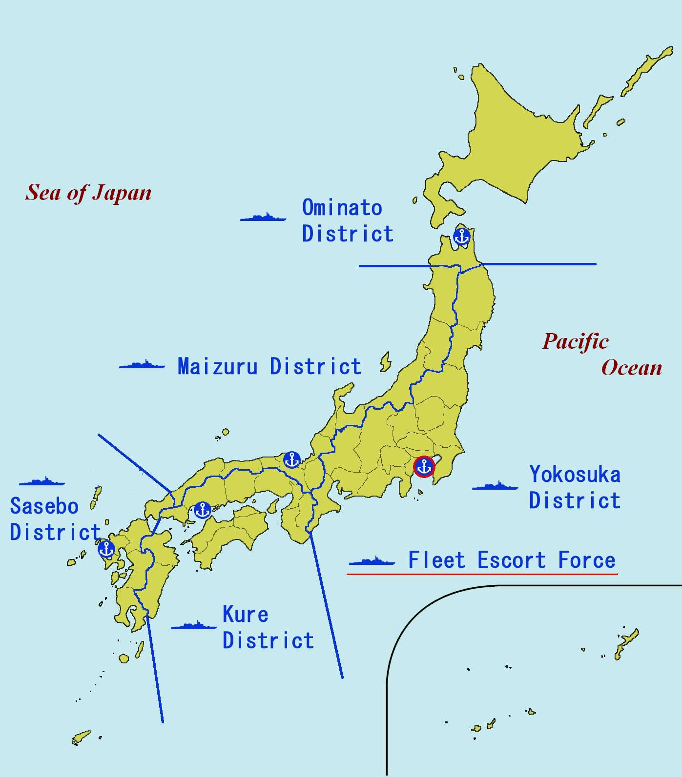 JMSDF Fleets